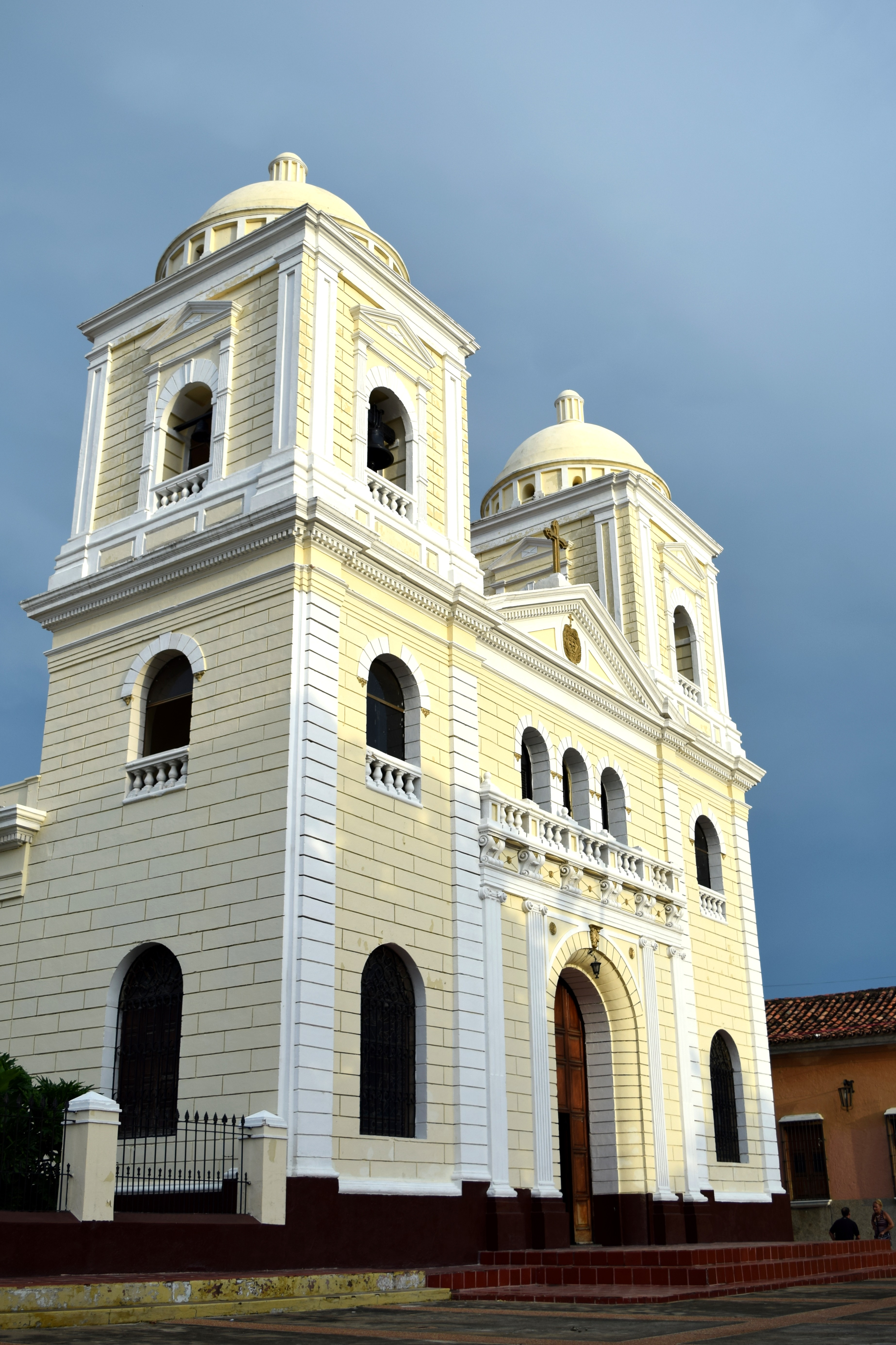 Perspectiva de la fachada principal de la Ermita del Carmen